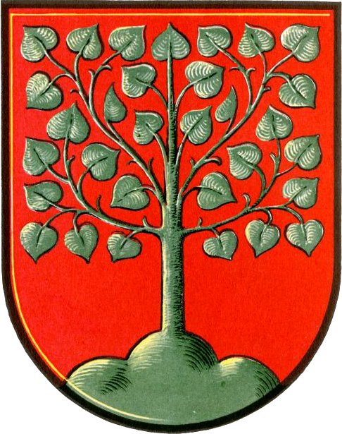 Das Angerer Marktwappen findet sich bereits auf einem Siegelstock des Jahres 1544 und zeigt eine stilisierte Linde auf einem Dreiberg.